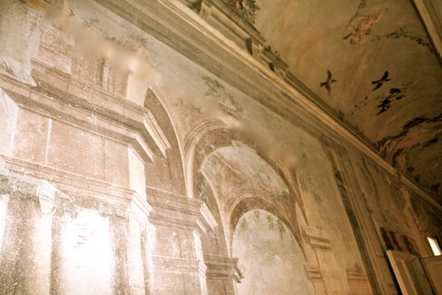 Palazzo dami, galleria, NICCOLO' PINTUCCI 1735